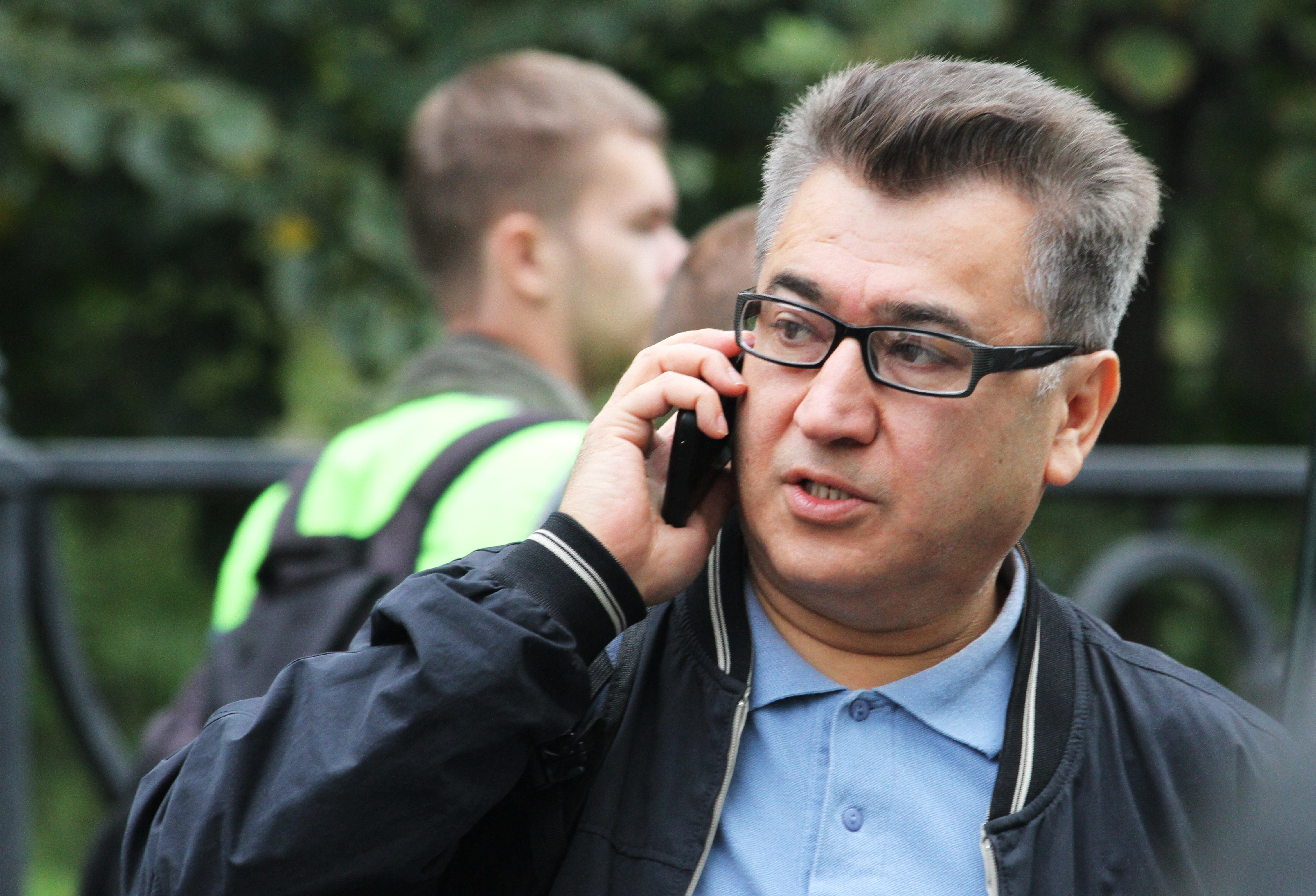 Mumin Shakirov